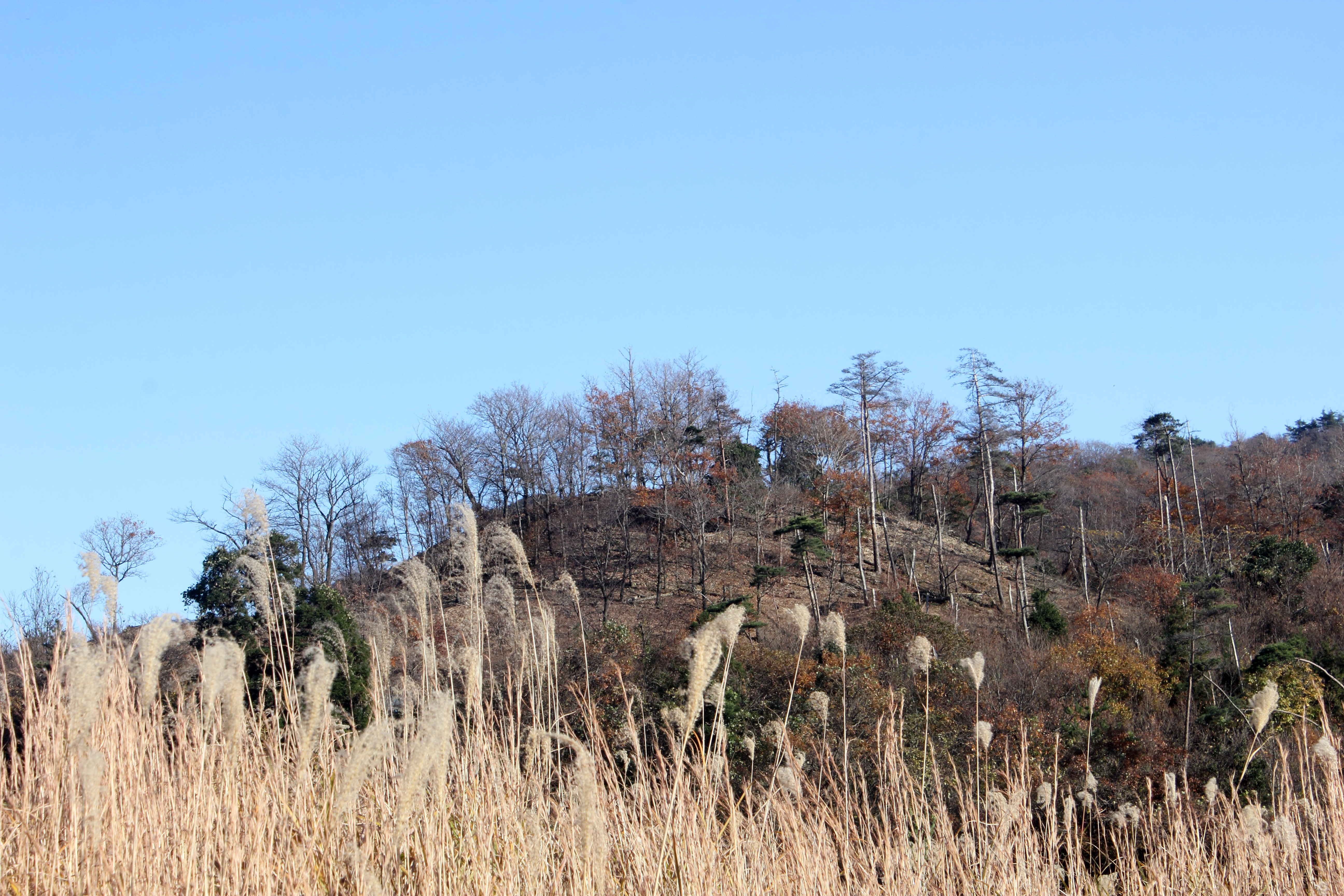 免鳥長山古墳（遠望）